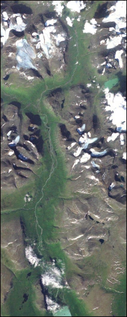 Rapadalen. Satellite picture, from NASA World Wind Globe